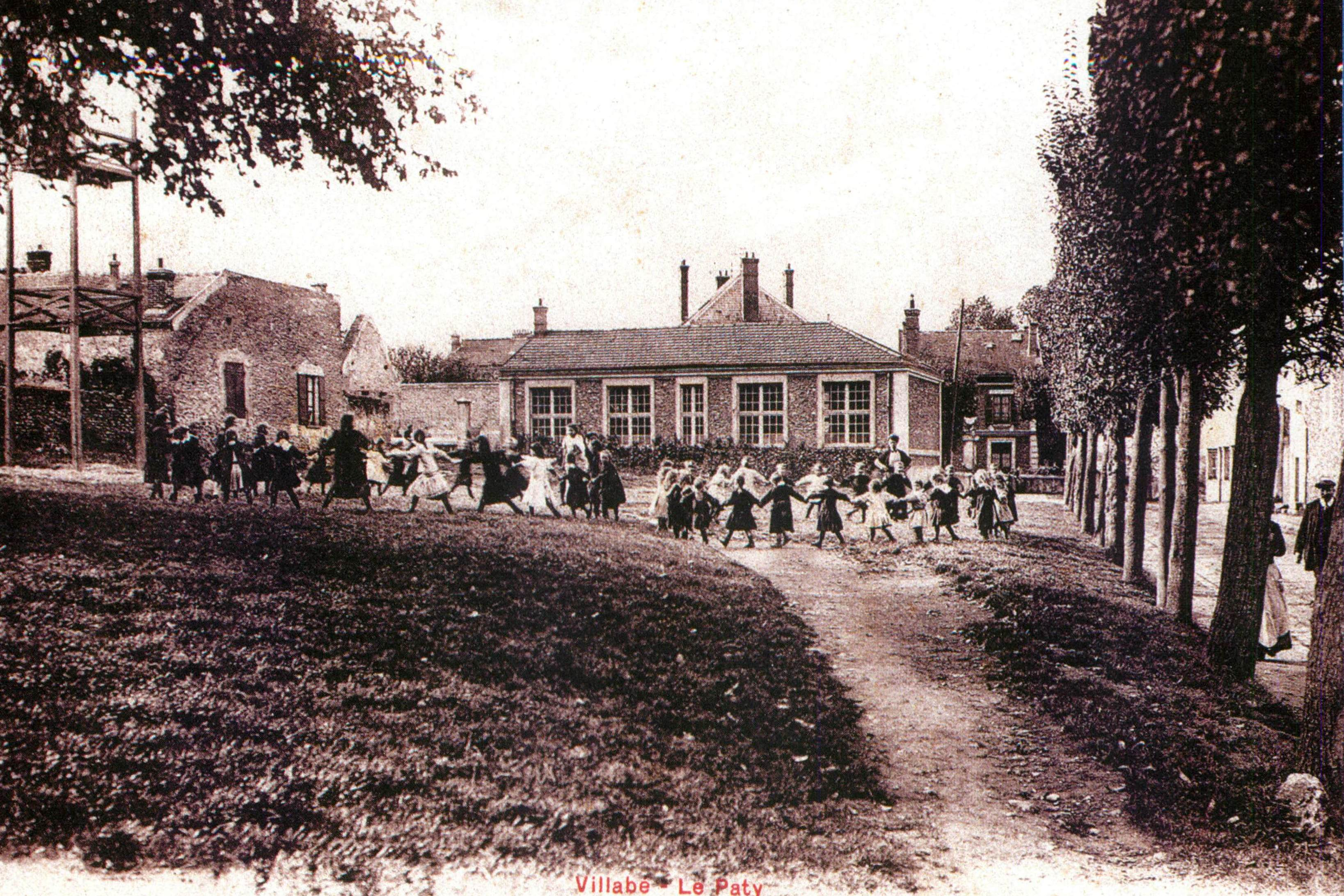 L'école des filles construite en 1884 dans le quartier du Pâtis, puis transformée en salle des fêtes et en salle du conseil municipal (salle Roger Duboz) / Villabé / Essonne / France